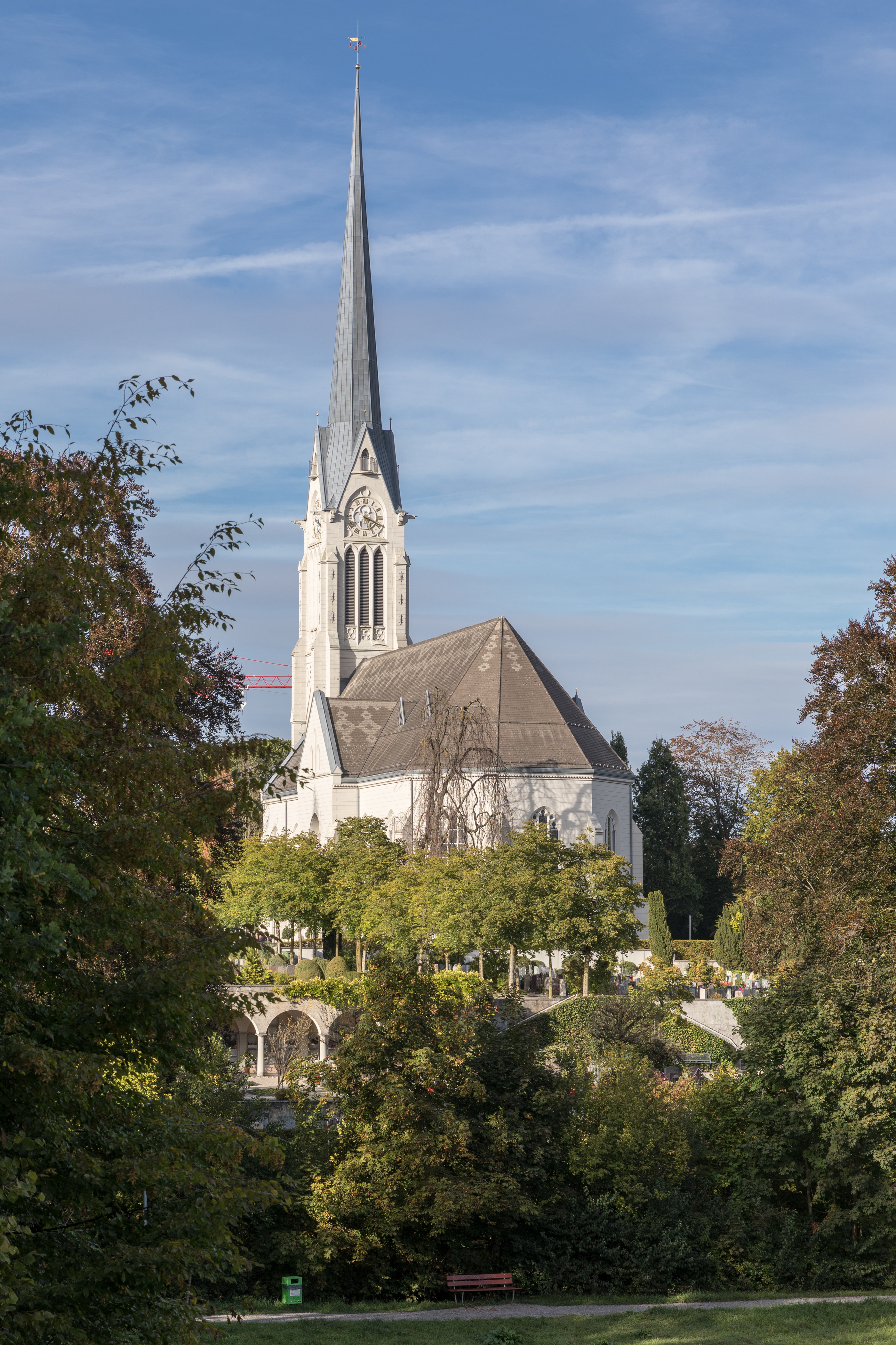 Reformierte Kirche